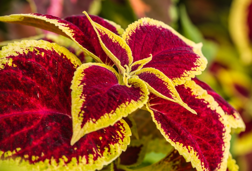 Sachsen: Blumennessel. Coleus Blumei Hybride - Zierpflanze